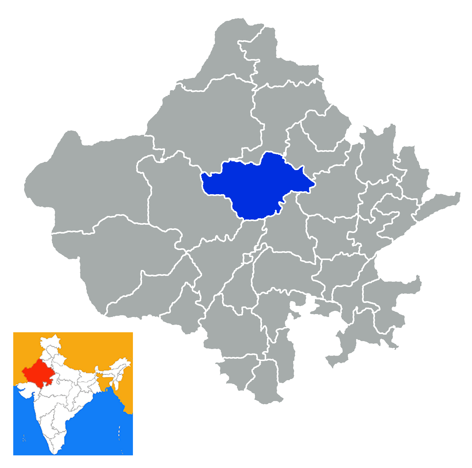 Distrito de Nagaur Rajastan India